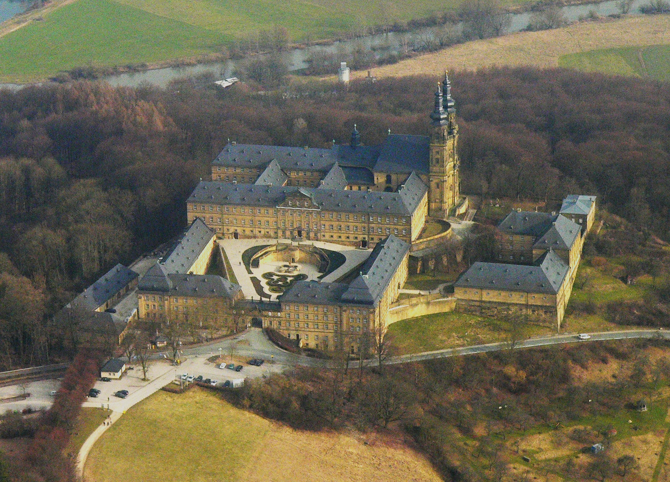 Kloster Banz bei Staffelstein, Oberes Maintal, Bayern